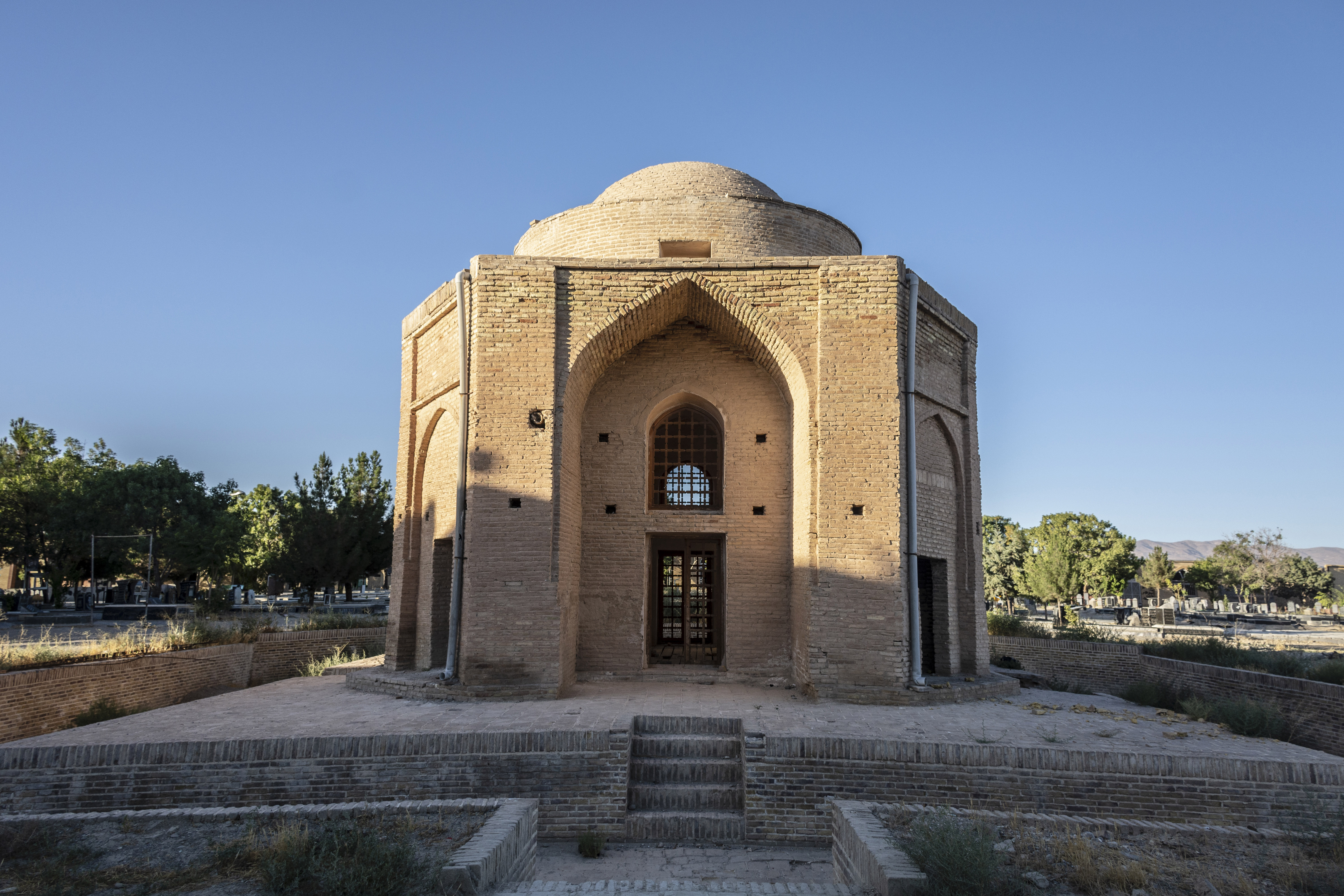 بنای چهارطاقی عصر تیموری یکی از آثار معماری خاص و جاذبه‌های به جای مانده در شهر شیروان در خراسان شمالی است که هر ساله گرشگران زیادی را به سمت خود جذب می‌کند.بناهای چهارطاقی نوع خاصی از معماری اصیل ایران است که سابقه آن به دوره اساطیری می‌رسد. آتشکده فریدون به نام بردسوره در بخارا، که در کتاب مسعودی از آن نام برده شده، یکی از بناهای چهارطاقی باستانی است. در دوره تاریخی نیز بنای نوبهار بلخ از آثاری است که سابقه آن به دوره اشکانی می‌رسد و با معماری چهارتاقی ساخته شده است. در بین بناهای دوره ساسانی نیز بناهایی از این دست دیده می‌شود. اما کهن‌ترین آرامگاه چهارتاقی مربوط به خاندان سامانی در بخارا است.